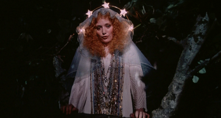 scena dal film La mazurka del barone, della santa e del fico fiorone